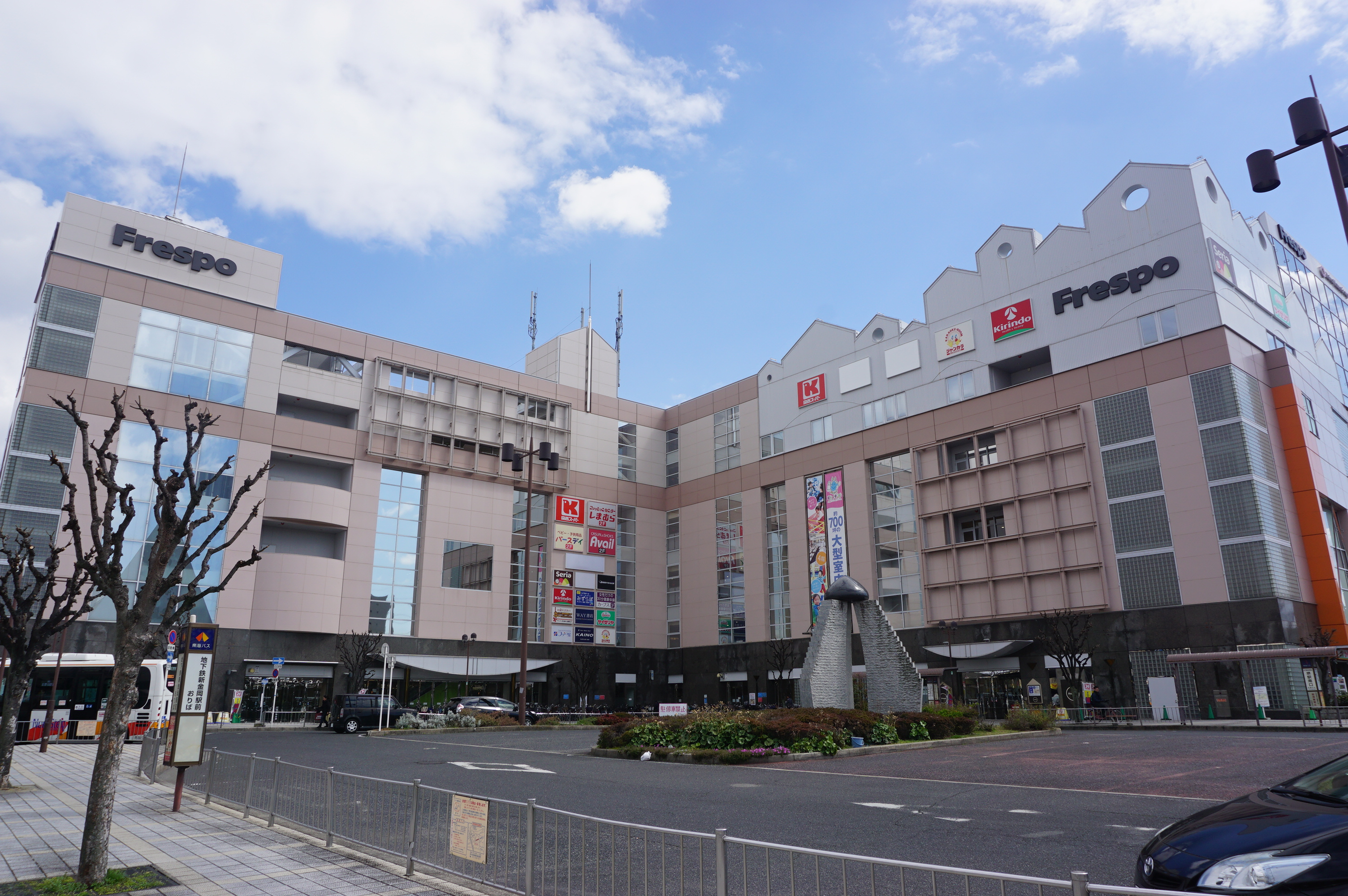 「フレスポしんかな」。かつてのしんかなCITY。 Sony ILCE-6000